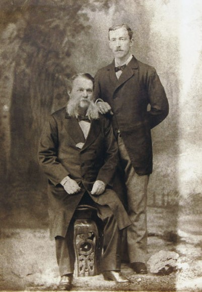 ウィリアム・クラーク・イーストレーク（左）とフレデリック・イーストレイク